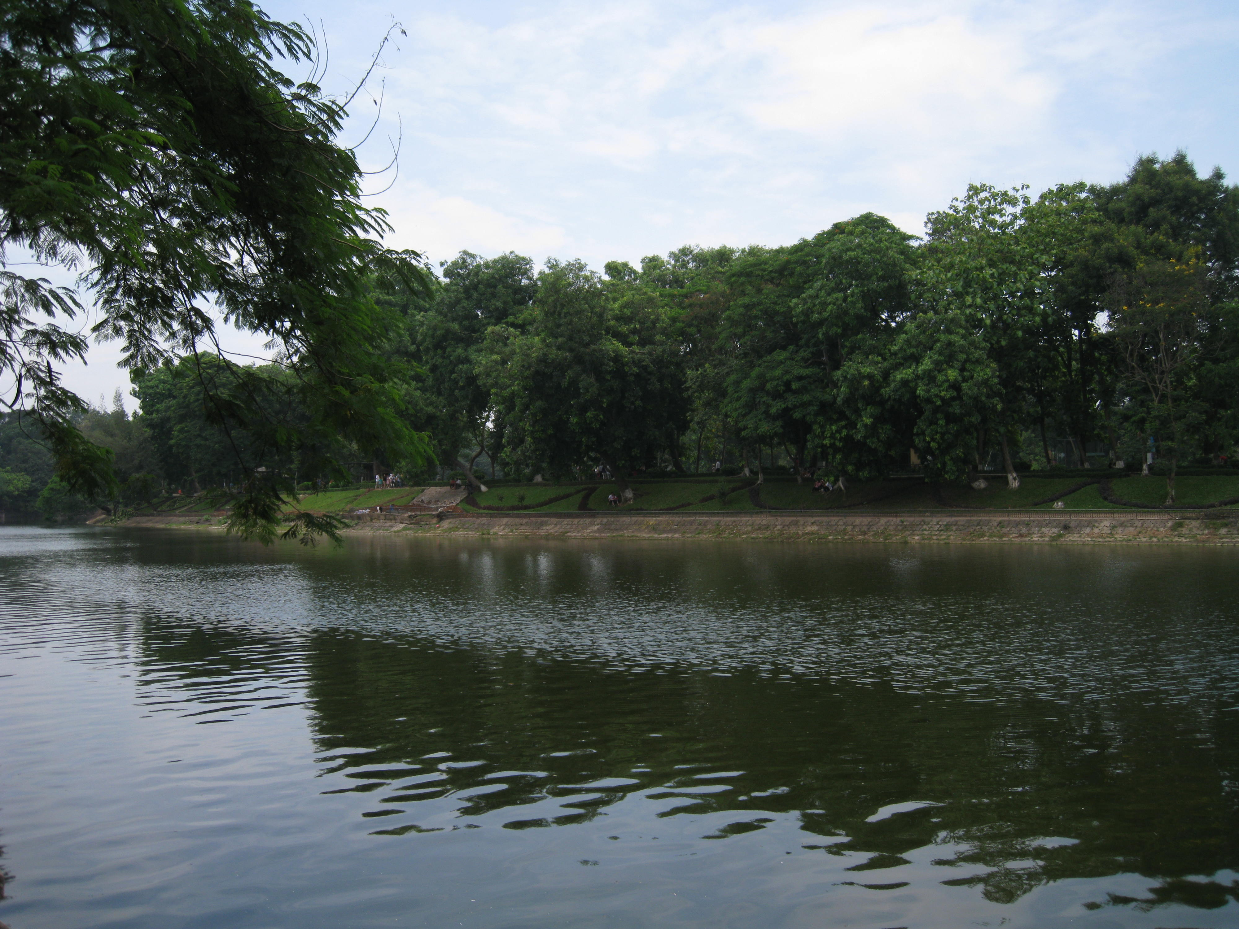 Công viên Thủ Lệ, nhìn từ phía đường Kim Mã qua hồ Thủ Lệ. Thủ Lệ park, taken from Kim Mã street through the Thủ Lệ Lake.